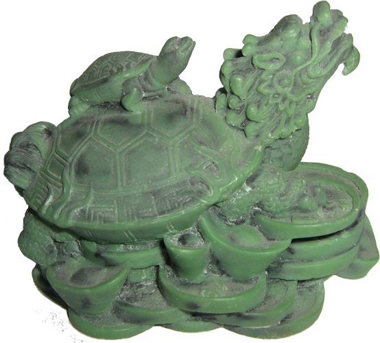 Драконочерепаха (龍龜)